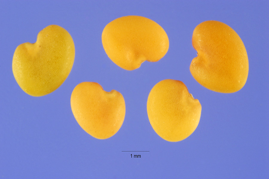 Astragalus cicer L. - cicer milkvetch